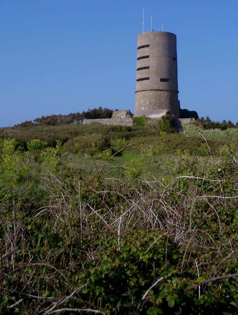 Deutsche Kuestenbefestigung aus dem Zweiten Weltkrieg auf Guernsey, auf alten Wachturm des Forts Saumarez aufgesetzt